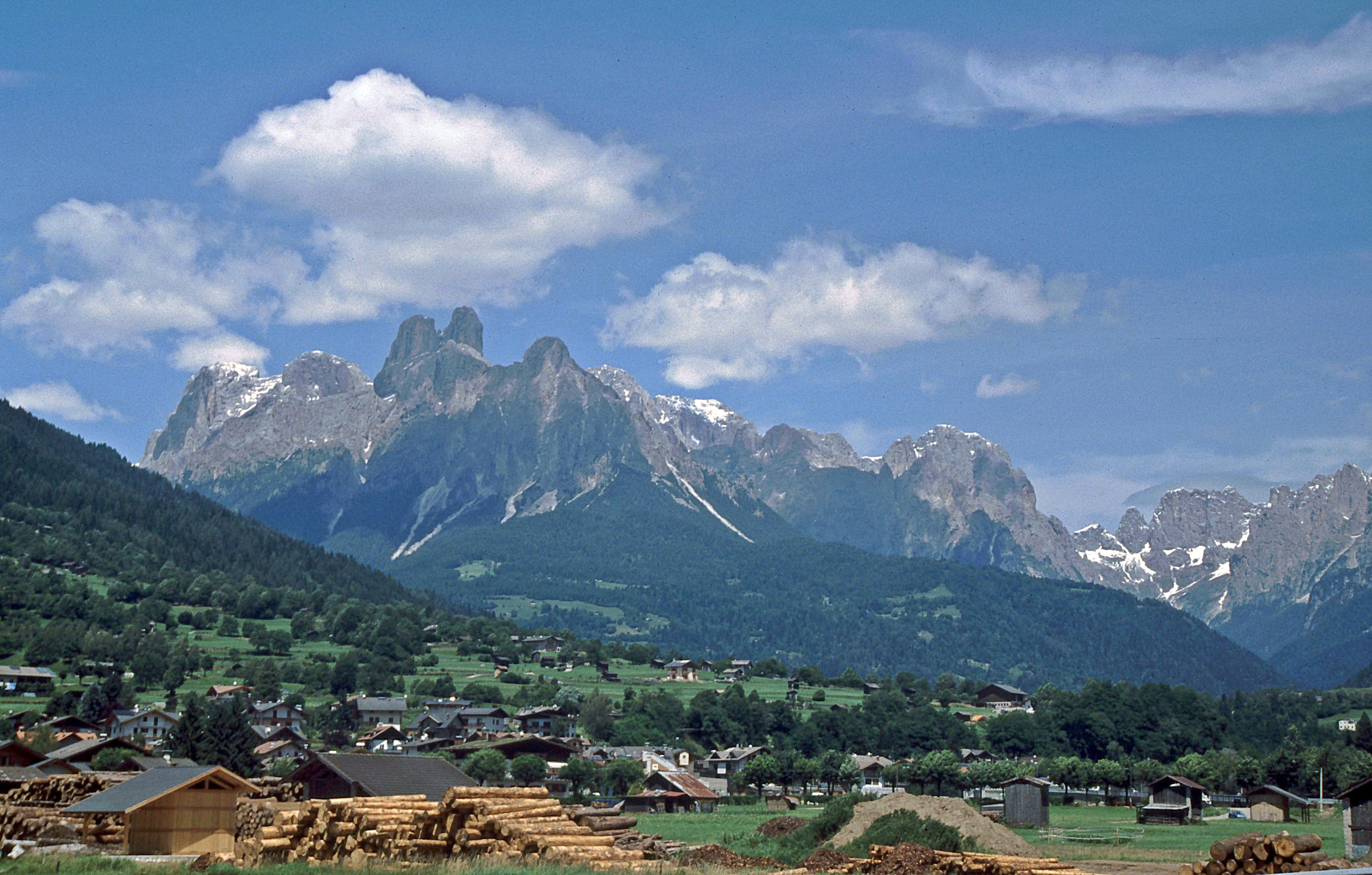 Pale di San Martino von Mezzano